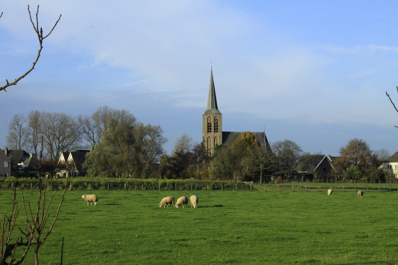 Hier Ravenswaaij gezien vanuit de polder, één en al rust!.